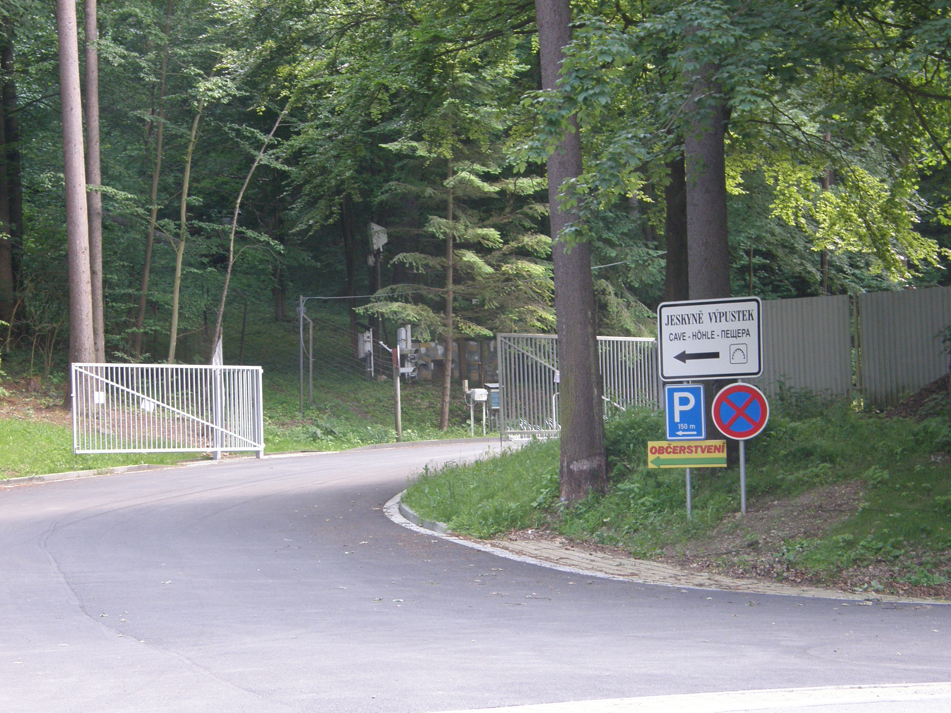 Jeskyně Výpustek - vjezd do areálu